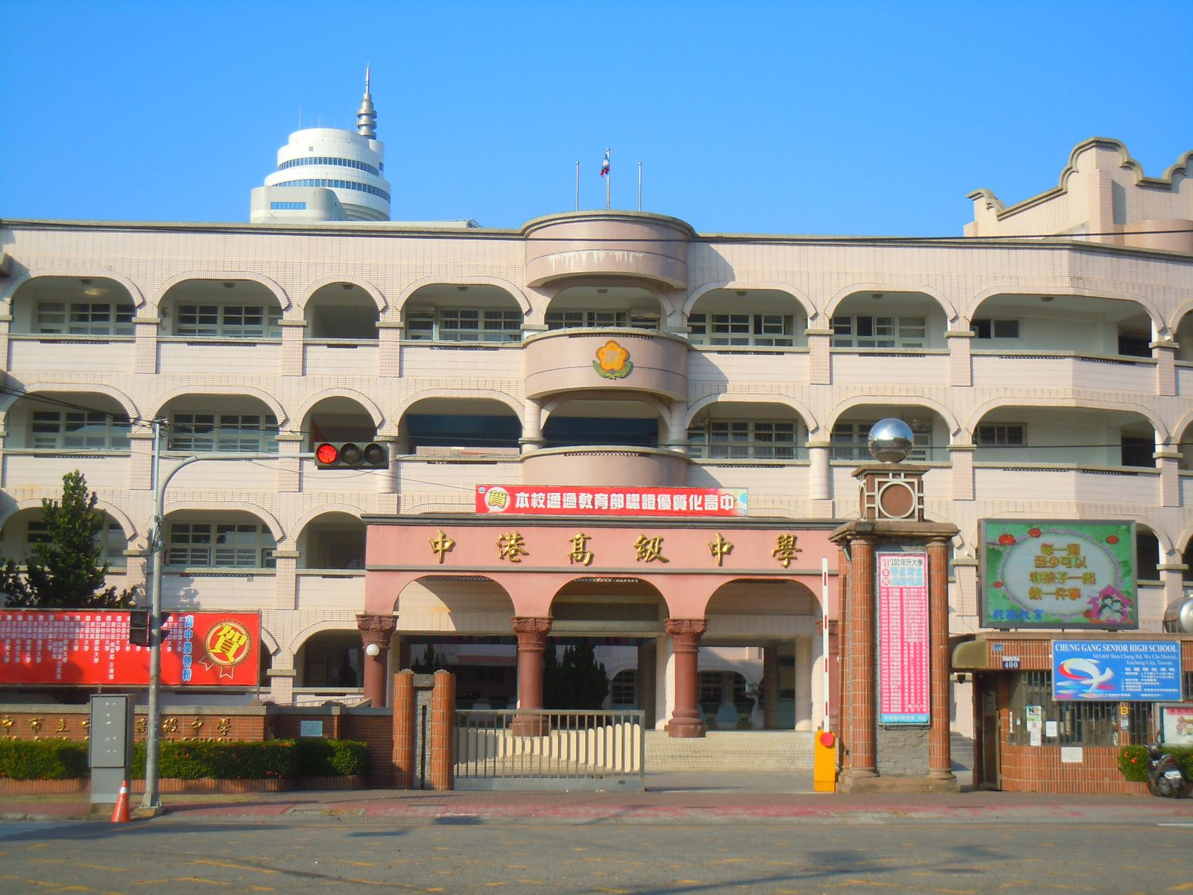 中文（台灣）: 臺中市梧棲區文昌路－臺中市立中港高級中學。